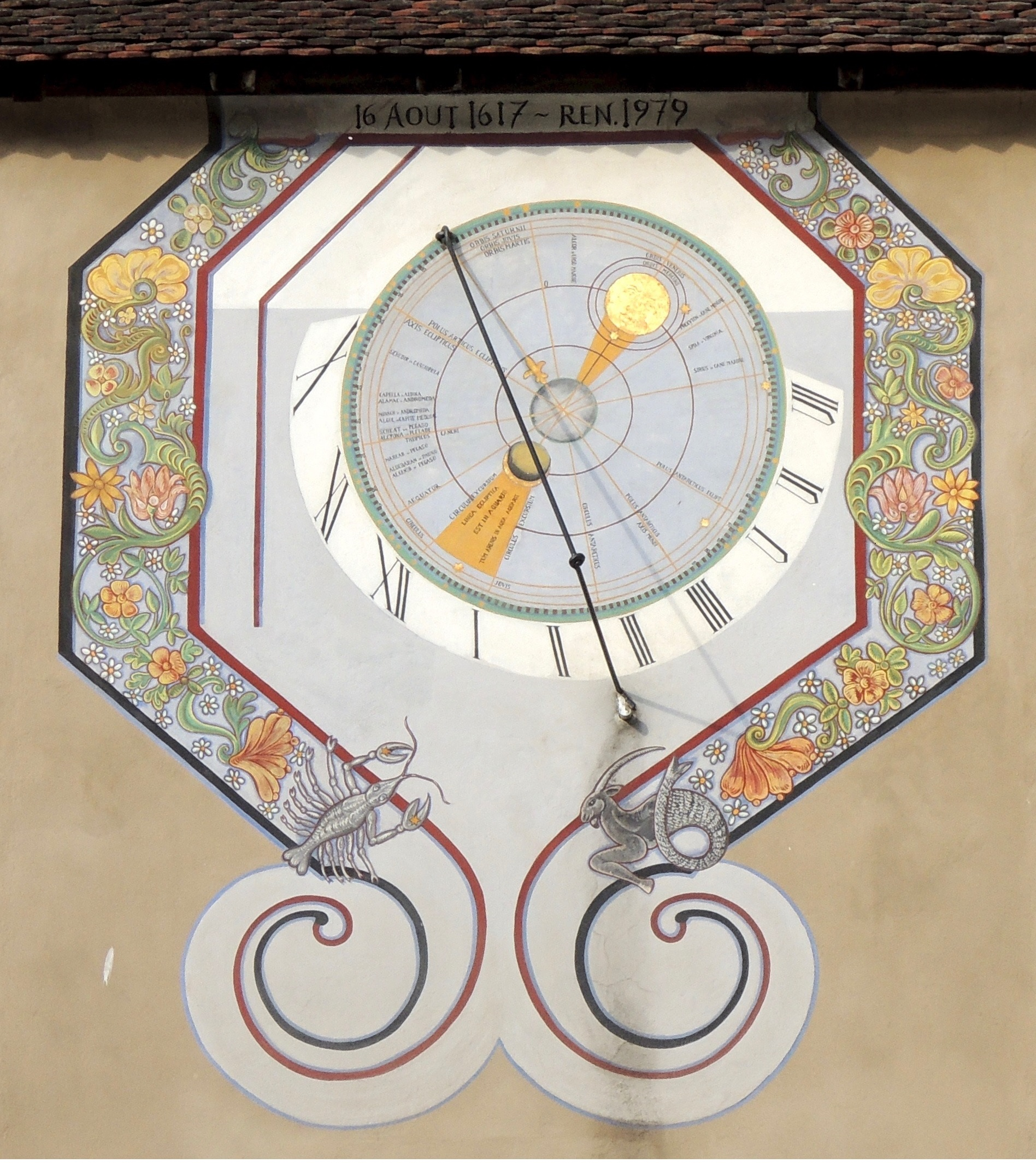 Le cadran solaire des récollets de Rouffach et sa fresque astronomique